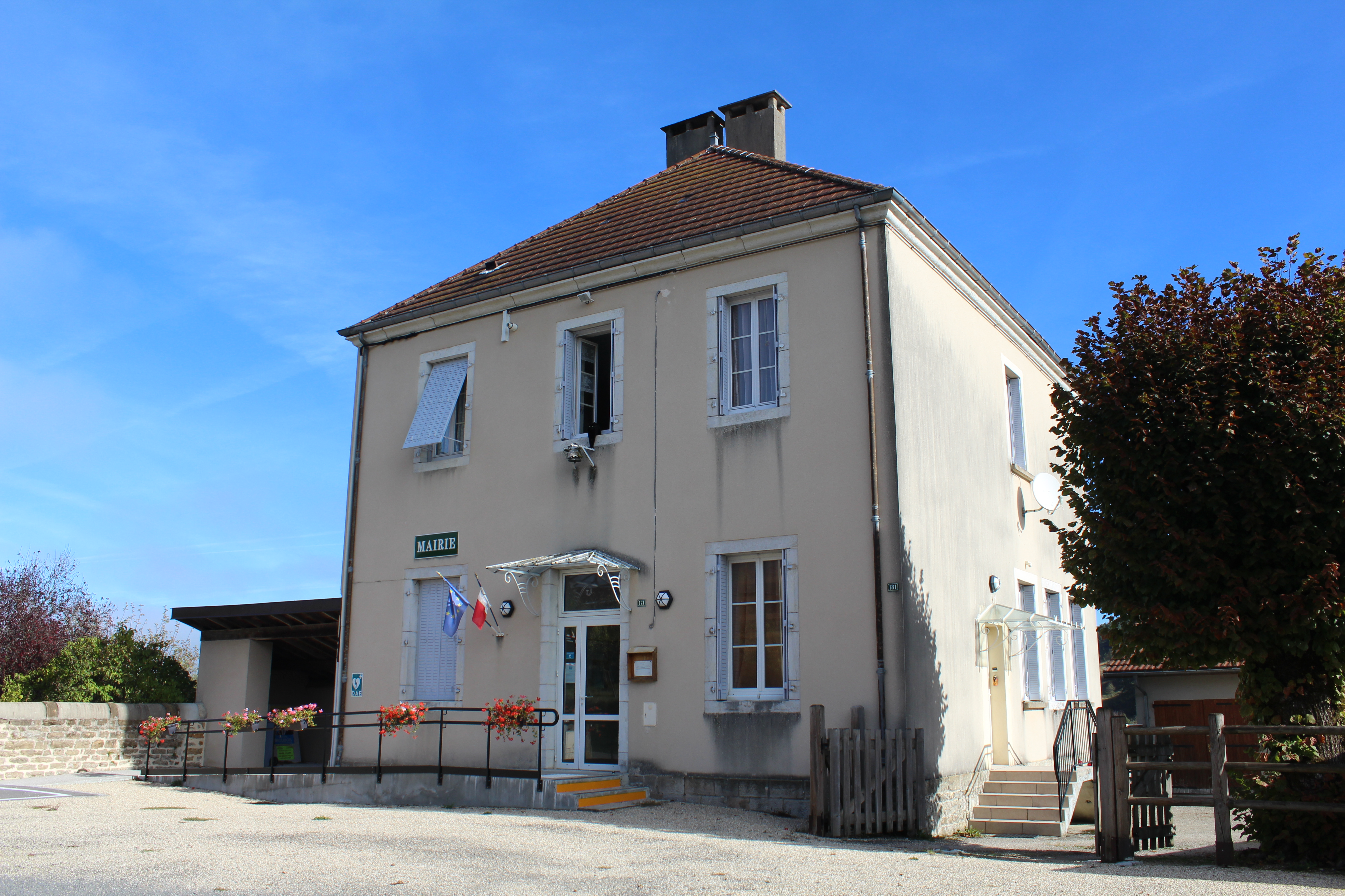 Mairie de Lains, Montlainsia.